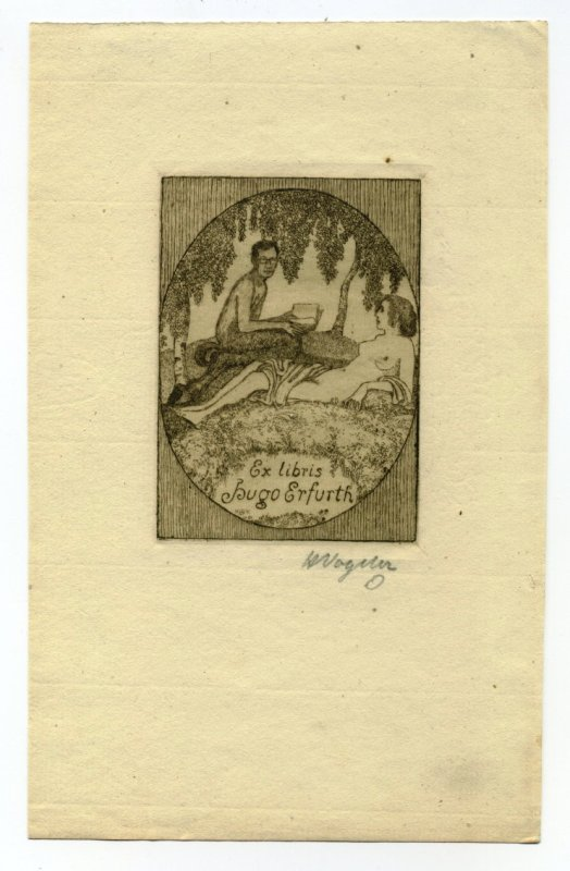 Ex Libris Hugo Erfurth. Hockender Faun, liegendem weiblichen Akt vorlesend. 84 x 60 mm, Radierung